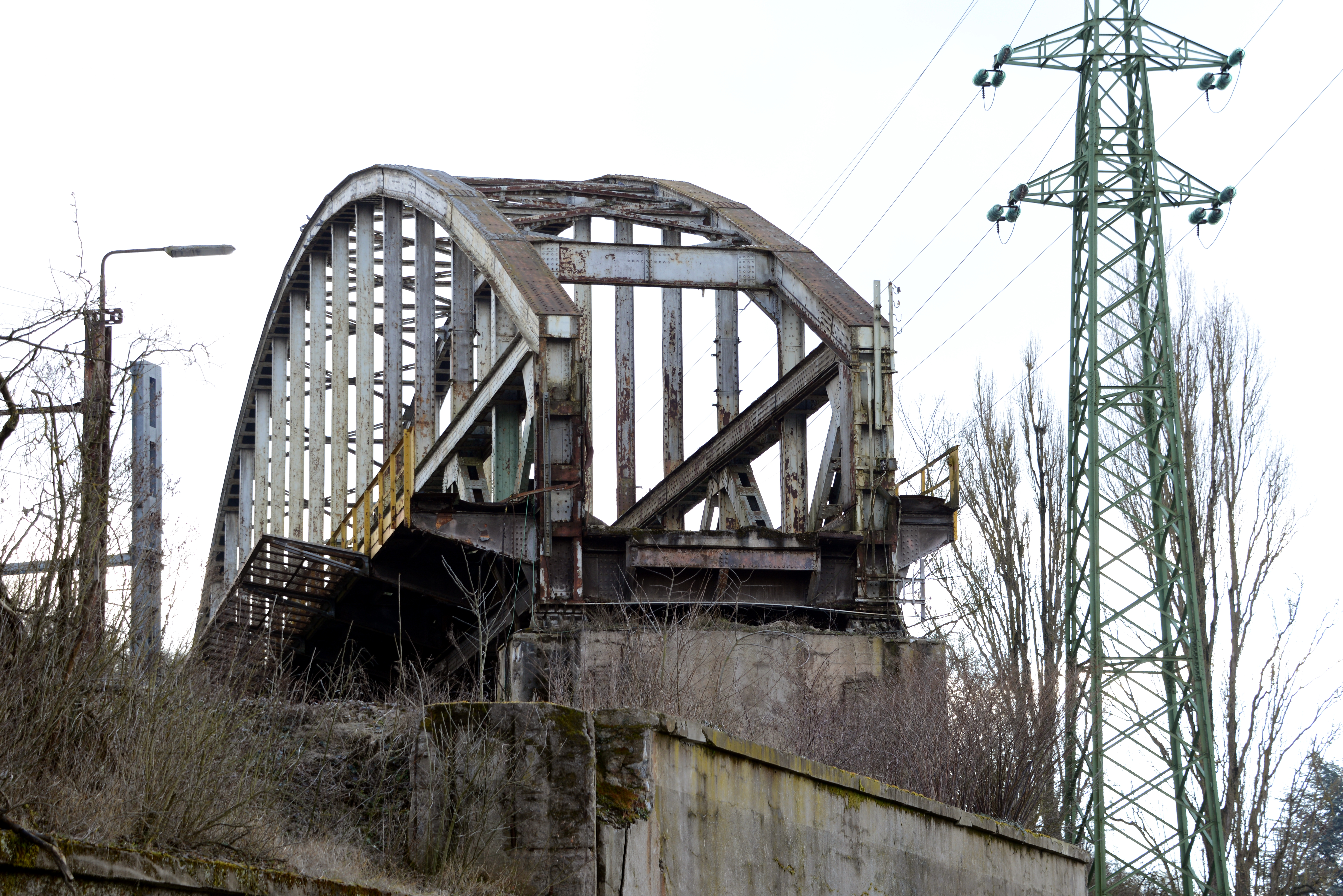 D'Iwwerreschter vun der Arbeds-Bréck Esch-Schëffleng.